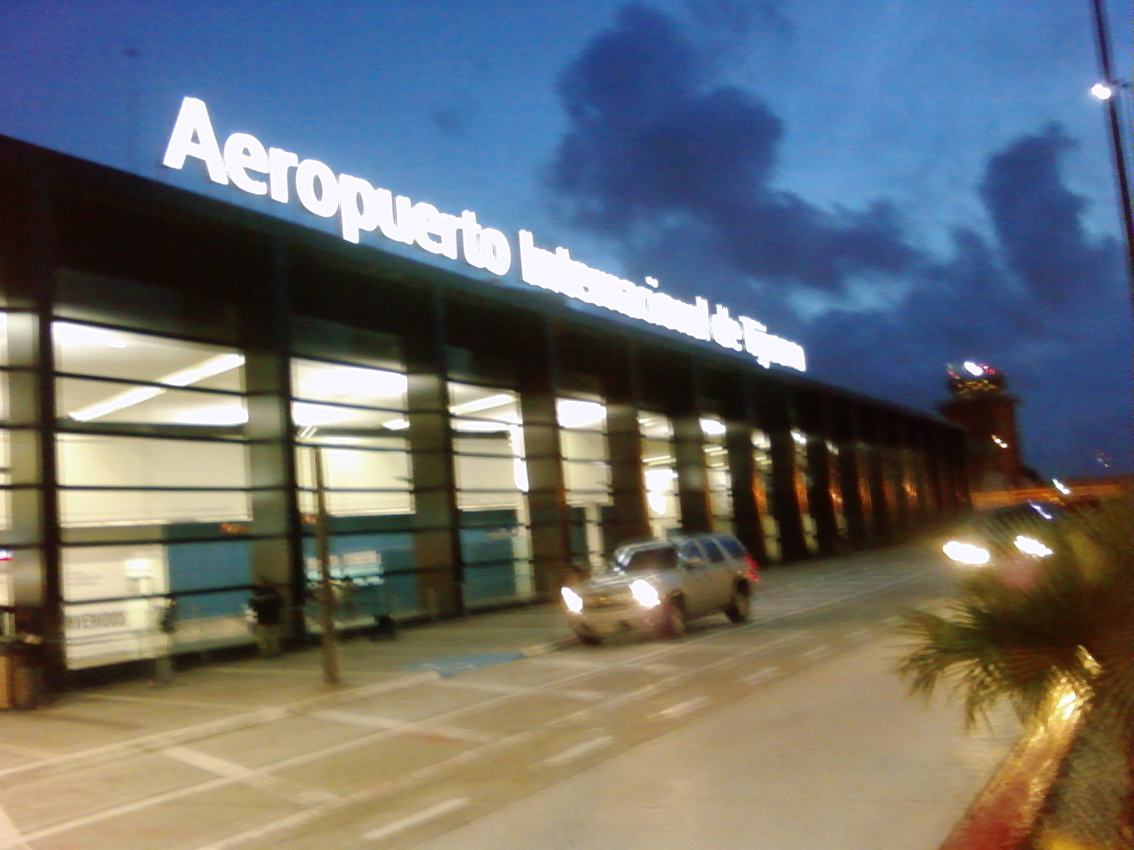 Aeropuerto Internacional de Tijuana